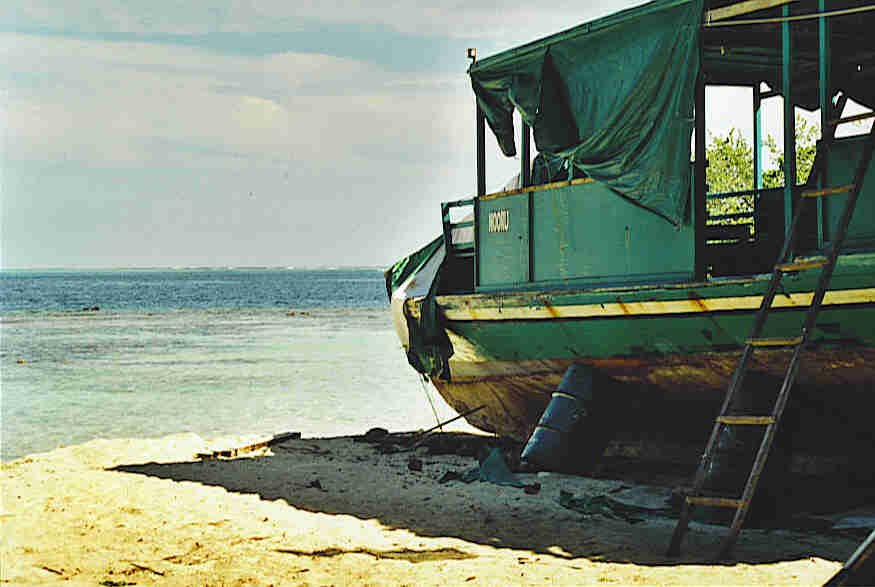 Ein Boot in der Werft (Dhoni) Aufnahmeort: Malediveninsel